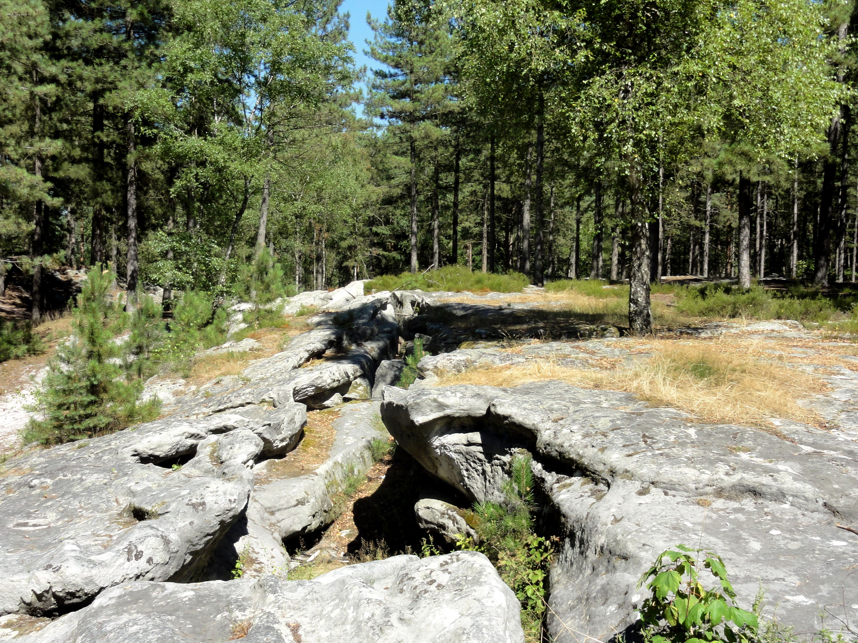 Près de la cave du diable, au sud de Vaumoise.